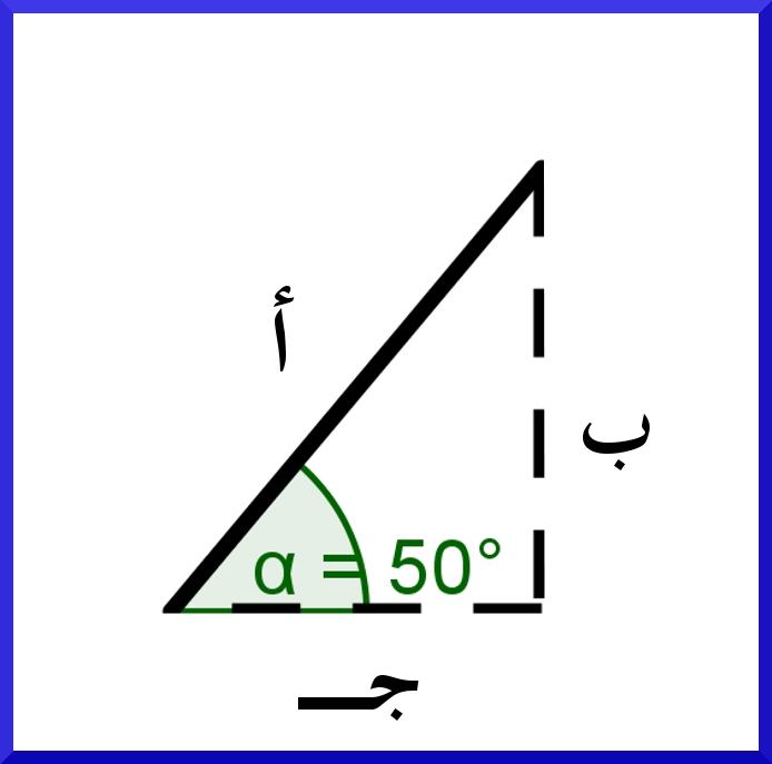 تبيين لمركبات الخط المائل بزاوية 50